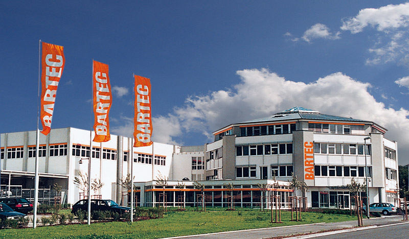 Firmensitz BARTEC in Bad Mergentheim